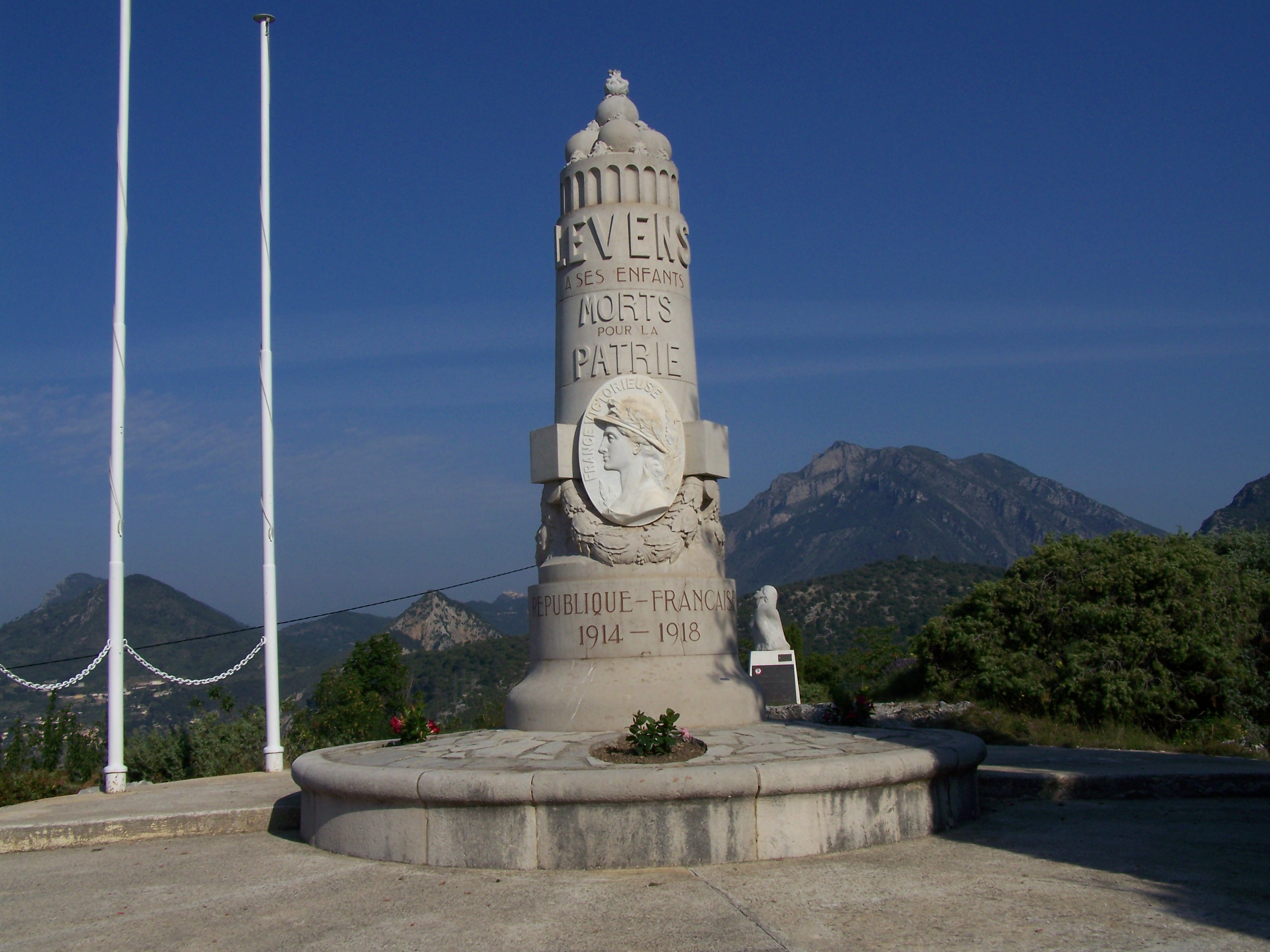 Momument aux morts de Levens (Alpes-Maritimes, France)